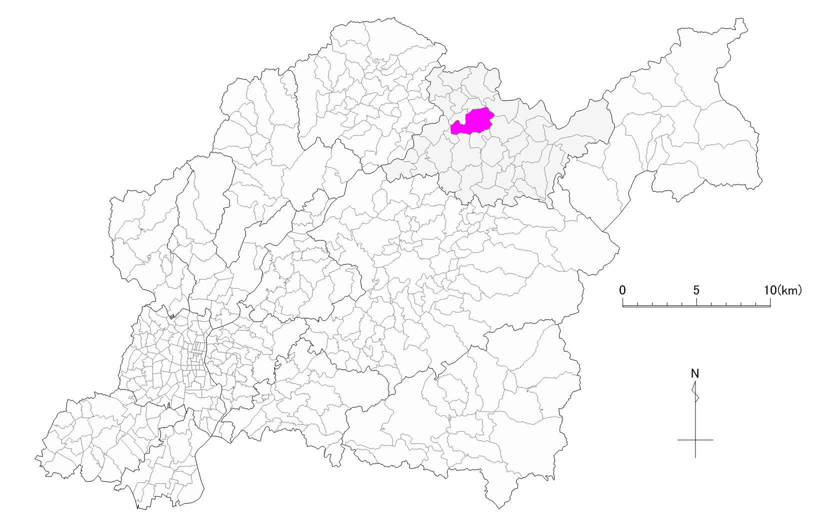 豊田市小渡町位置図